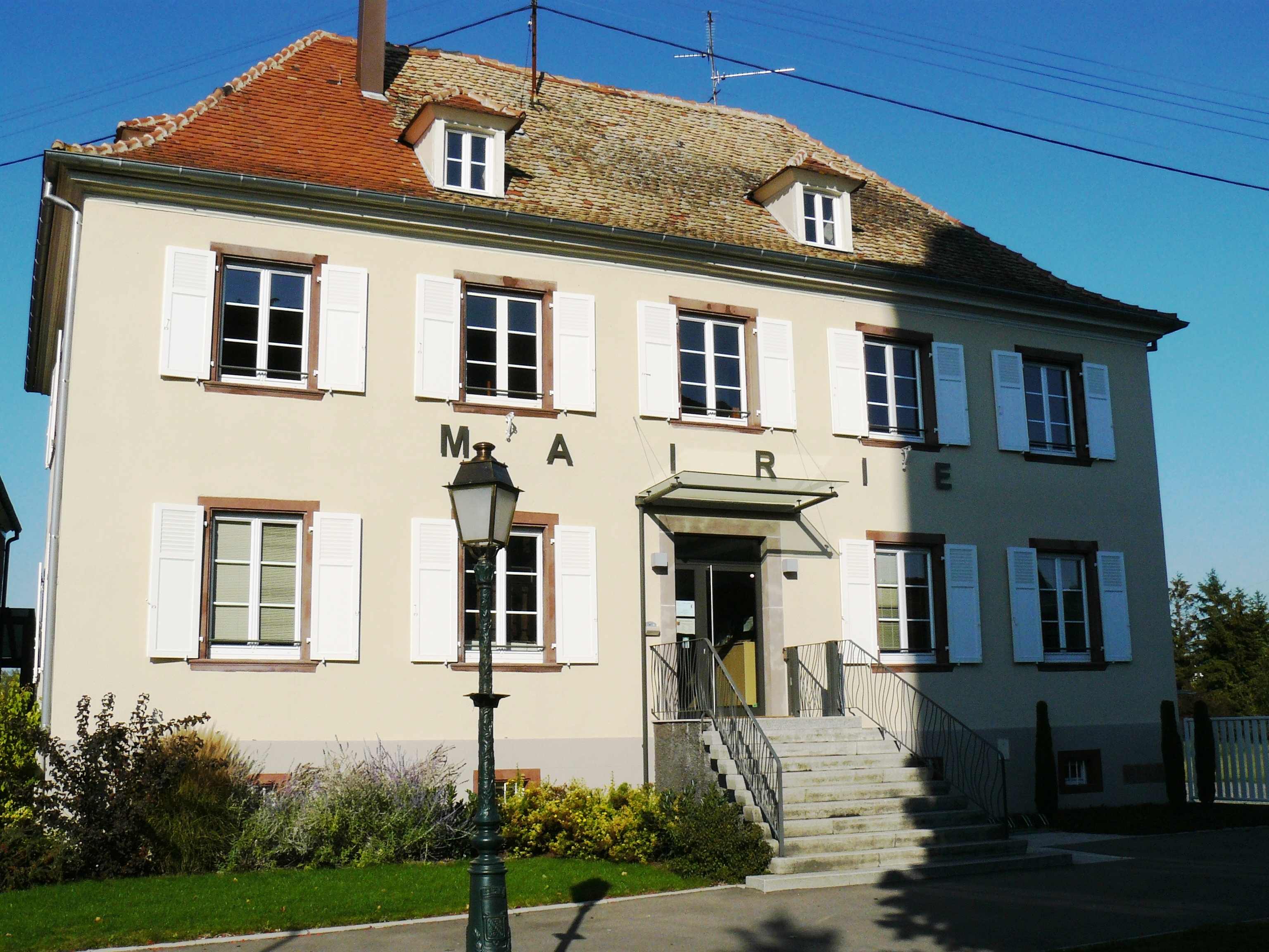 Mairie